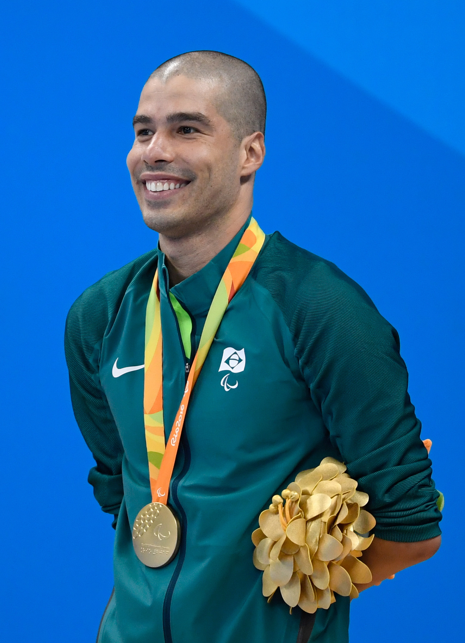 Rio de Janeiro - Brasileiro Daniel Dias leva medalha de ouro nos 200m nado livre S5 nos Jogos Paralímpicos Rio 2016, no Estádio Aquático